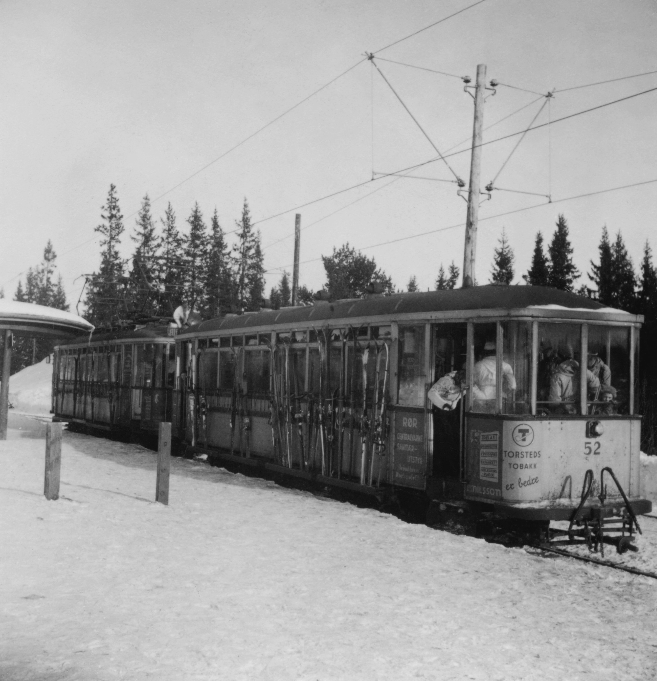 Format: Svart-hvitt fotopositiv Dato / Date: 1942 Fotograf / Photographer: Fridolin Zint (1907 - 1985) Sted / Place: Lian, Trondheim Wikipedia: Gråkallbanen Eier / Owner Institution: Trondheim byarkiv, The Municipal Archives of Trondheim Arkivreferanse / Archive reference: Tor.H49.B07.FZ085 Merknad: Bilder donert til Trondheim byarkiv av Joachim Zint, sønn av ingeniør Fridolin Zint (1907 - 1985). Fridolin Zint tjenestegjorde i Trondheim 1942 som Gefreiter ved Festungs-Pionier-Kommando XVI (Feldpostnummer 42399). I perioden 21.01.1942 - 31.07.1942 var han innkvartert i Trondhjems borgerlige Realskole. Billedsamlingen viser bl.a. reisen fra militærleiren i Zerbst i Tyskland til Trondheim via Danmark og Kattegat, brannen i Harmonien 27.01.1942 og avreisen fra Norge via Oslo og tilbake til Tyskland sommeren 1942. Flere av bildene er fargefotografier. I etterkant av tjenestetiden i Trondheim ble Fridolin Zint teknisk inspektør i Wehrmacht og steg i gradene inntil han ved krigens slutt var oberleutnant.